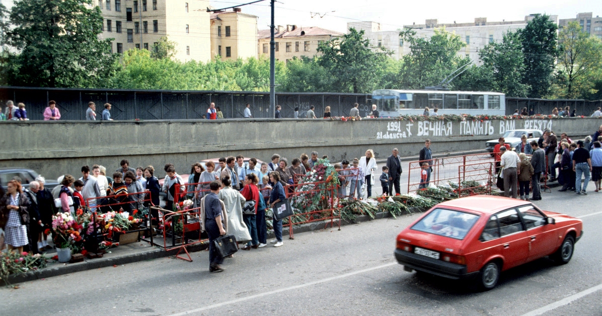 Место гибели 3 жертв противостояния ГКЧП. Сразу после августовского путча.